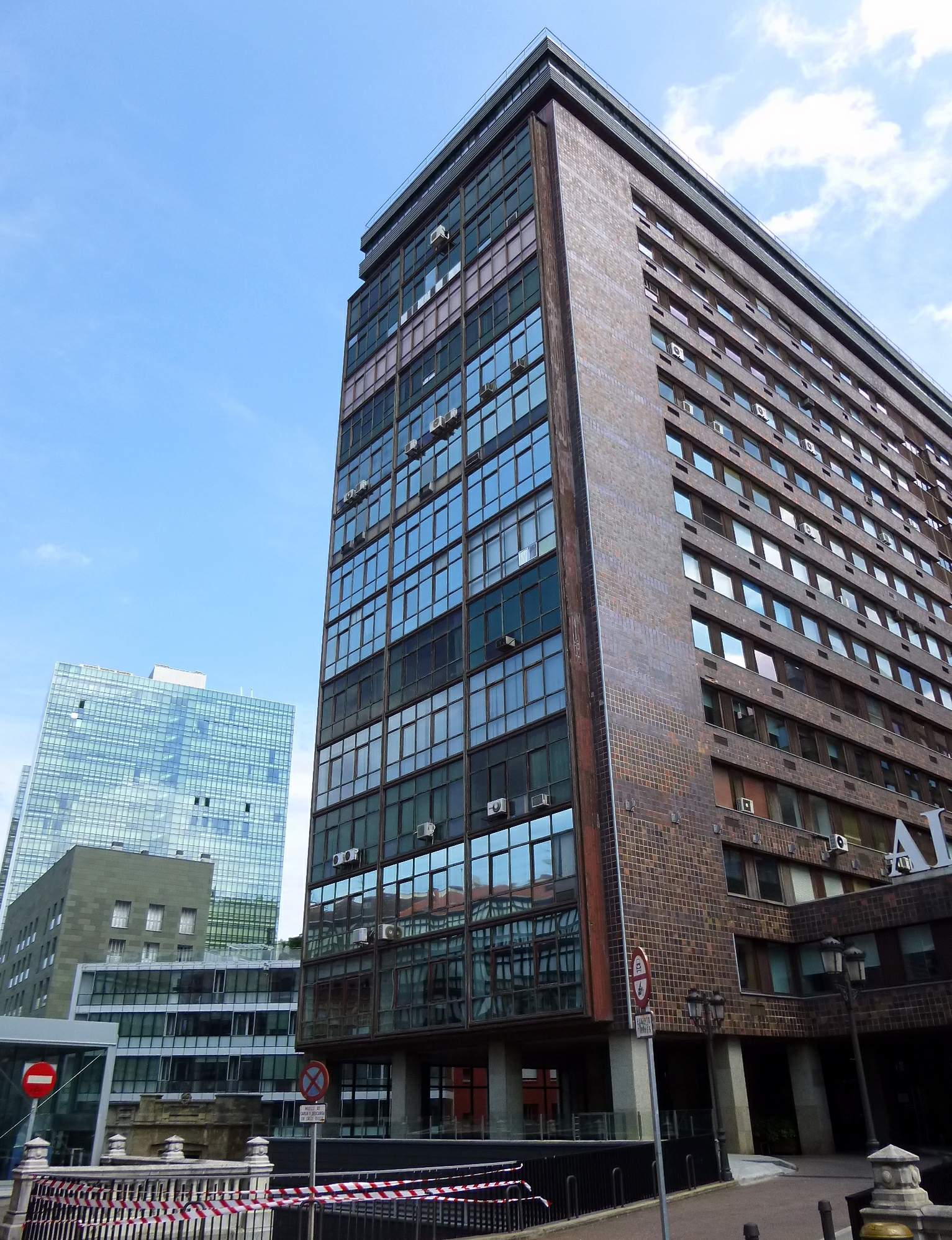 Edificio Albia (Bilbao)